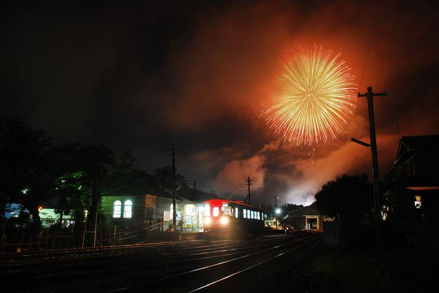 akechi hanabi 明知鉄道明知線